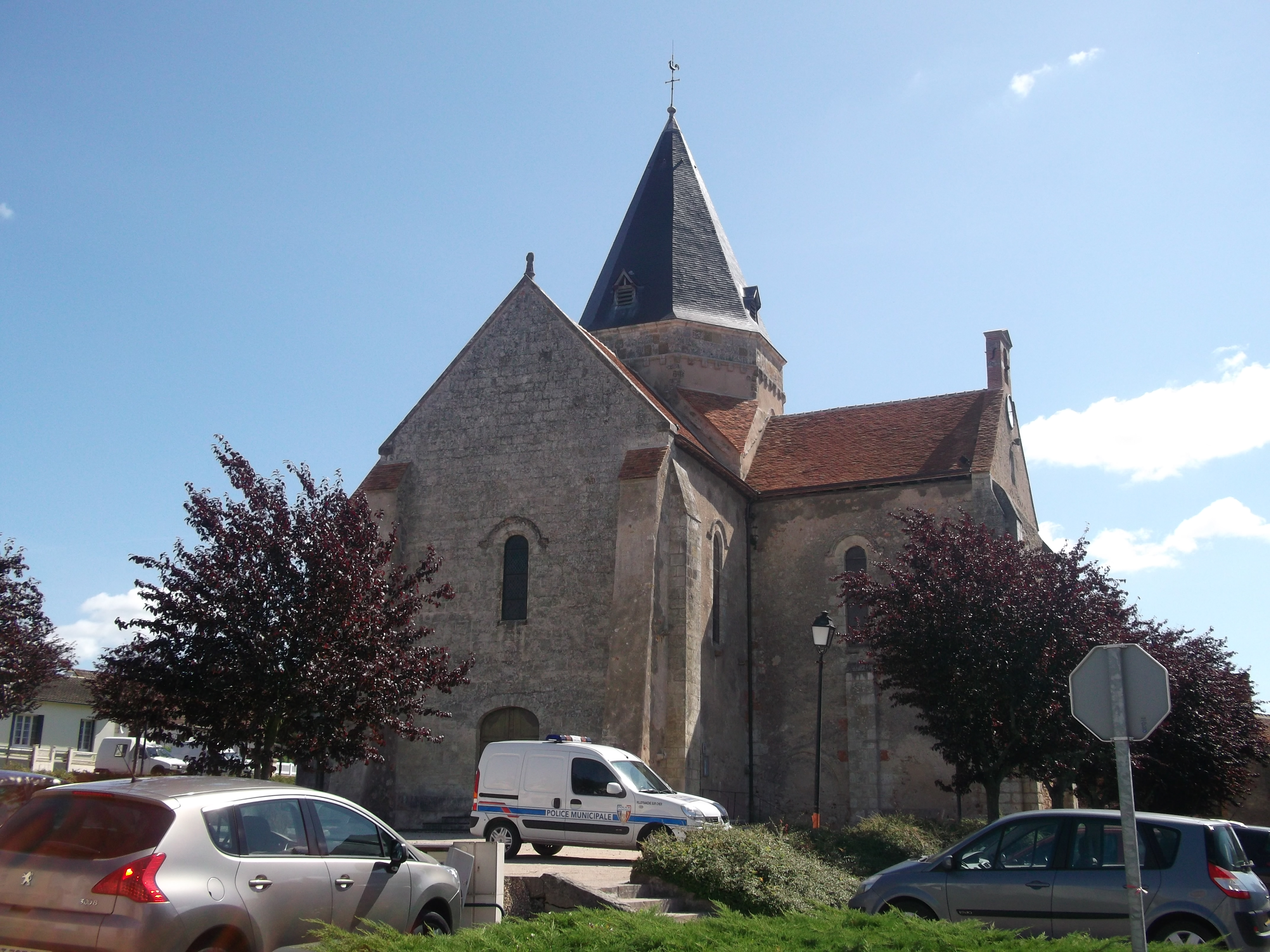 Eglise romane de Villefranche-sur-Cher